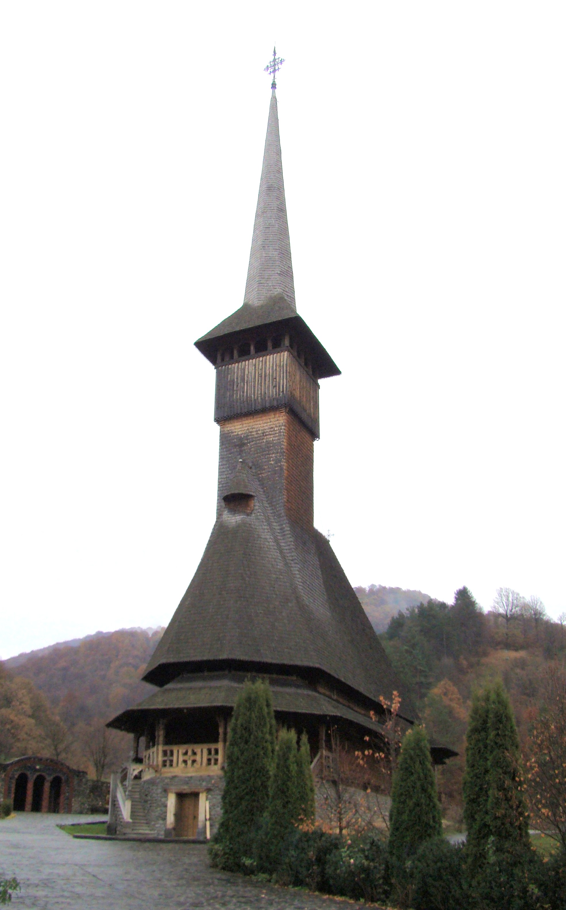 Mănăstirea Bârsana, Maramureș